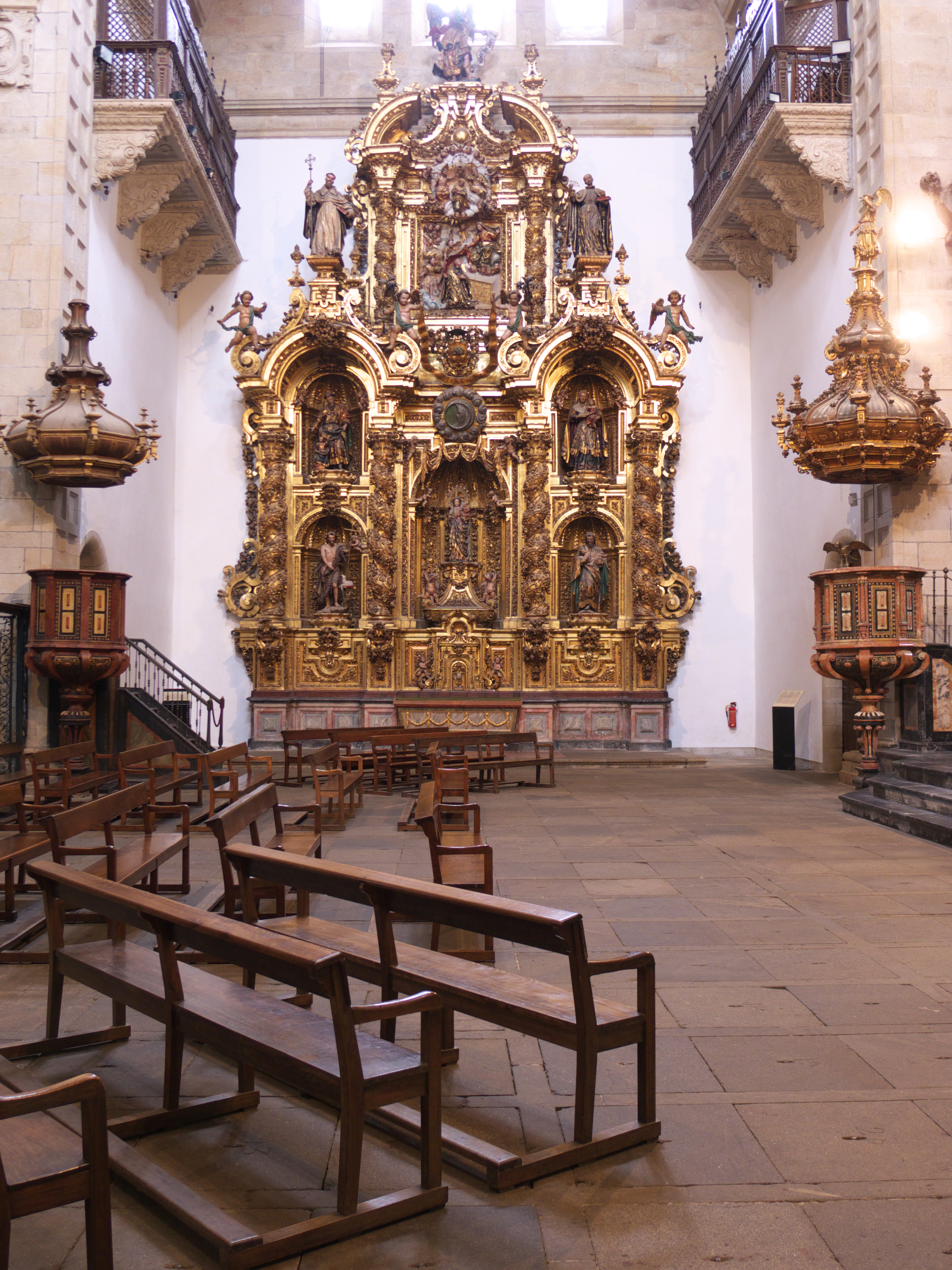 La imagen titular de la Virgen es de procedencia inglesa. Retablo de Fernando de Casas y Novoa con la escultura de Diego de Romay.